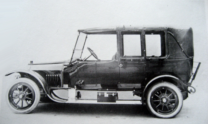 Car made by Dick & Kirschten, Offenbach